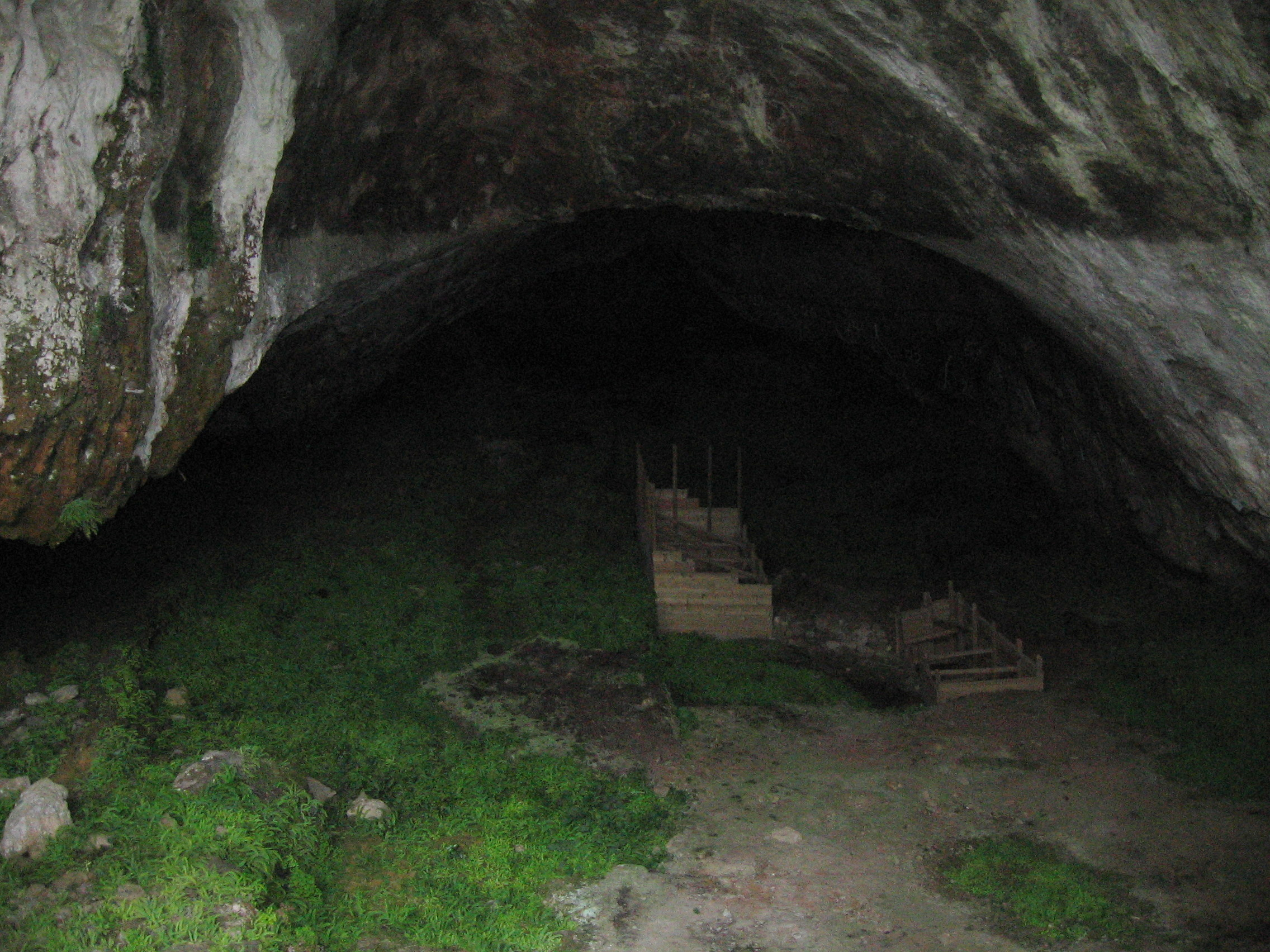 Arenazako leizea